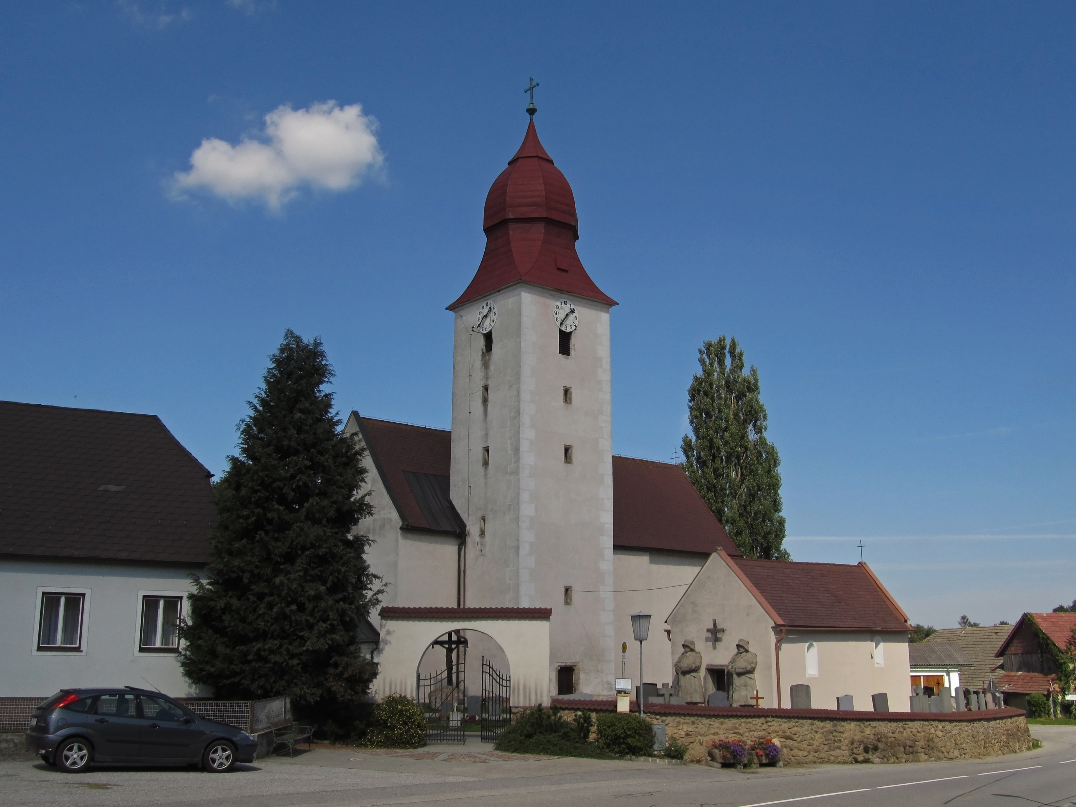 Die Ende 13./Anfang 14. Jahrhunderts errichtete, gotische Kirche mit spätgotischem Chor und Südturm wurde 1726 barockisiert.